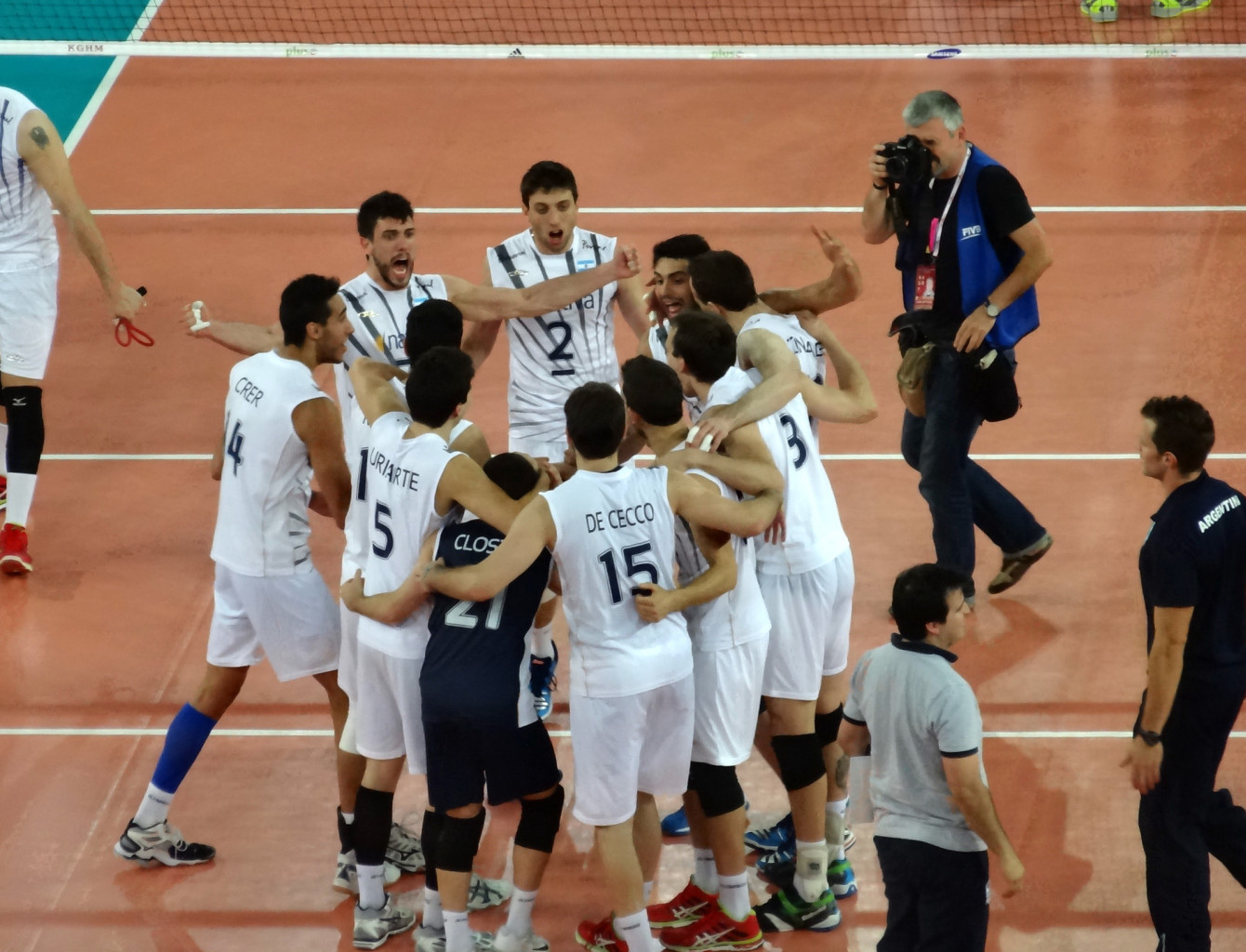 Mecz drugiej fazy grupowej Argentyna - Stany Zjednoczone (3:2) w hali widowiskowo-sportowej "Łuczniczka" w Bydgoszczy podczas Mistrzostw Świata w Piłce Siatkowej Mężczyzn 2014